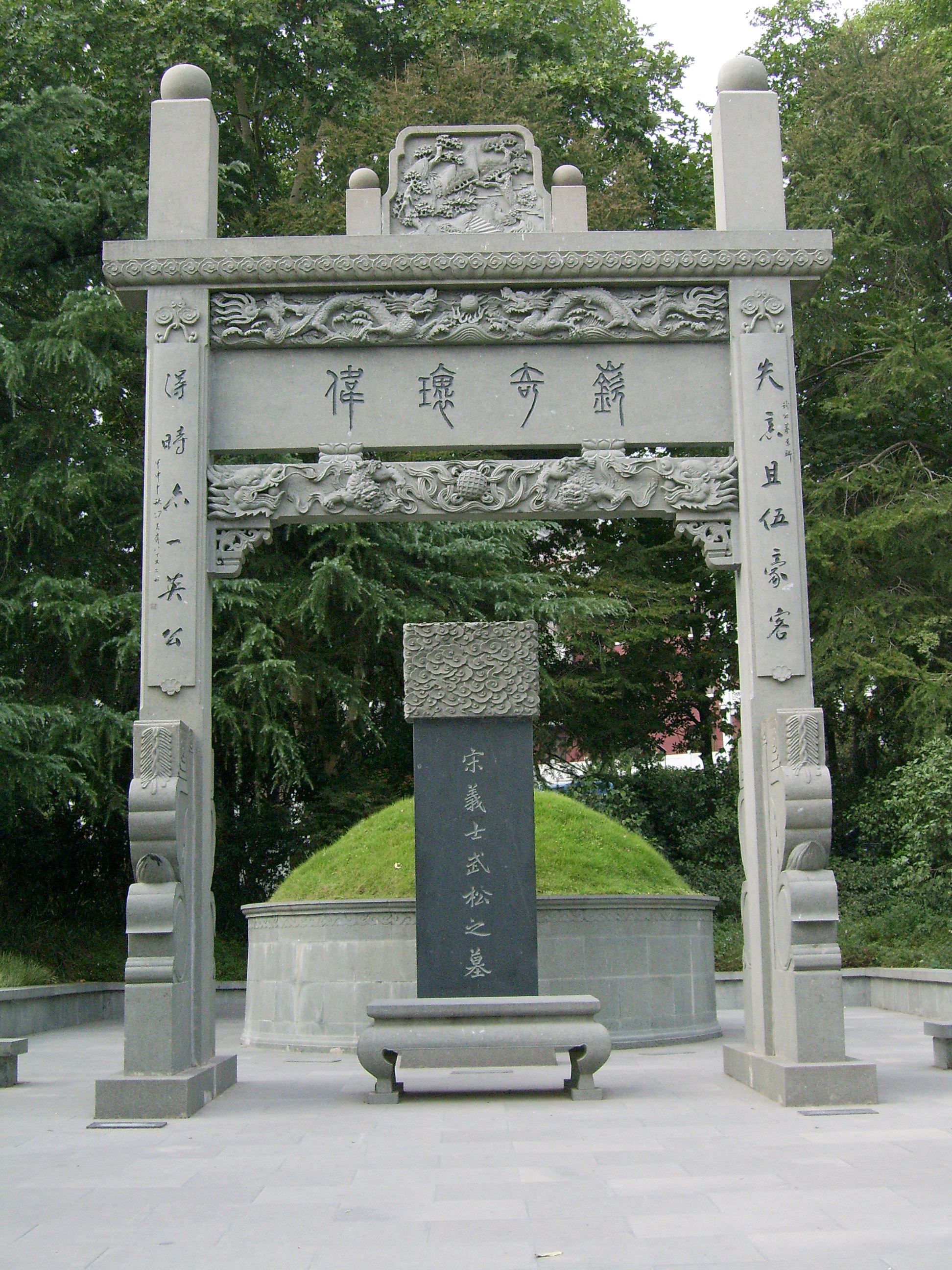 西湖边上的武松墓 Shizhao2005年于杭州